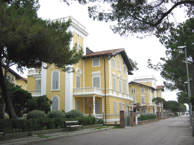 Villa Bianchi, Grado, Friuli Venezia Giulia, Italy